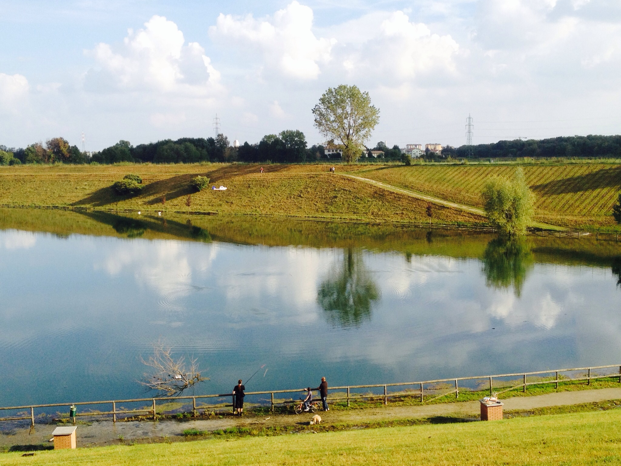 Parco Increa This is a photo of a monument which is part of cultural heritage of Italy.